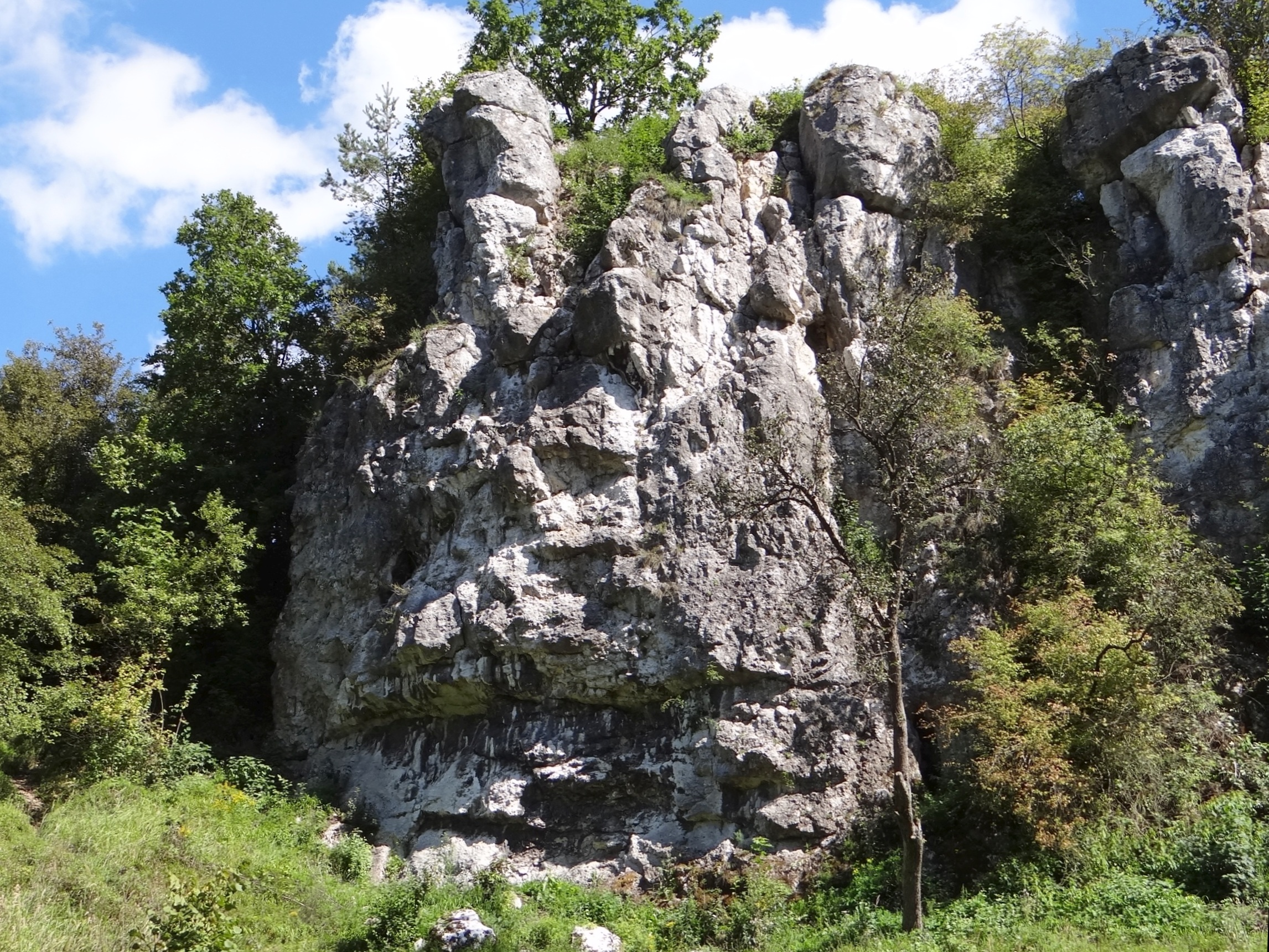 Skała Zamczysko w Dolinie Kluczwody